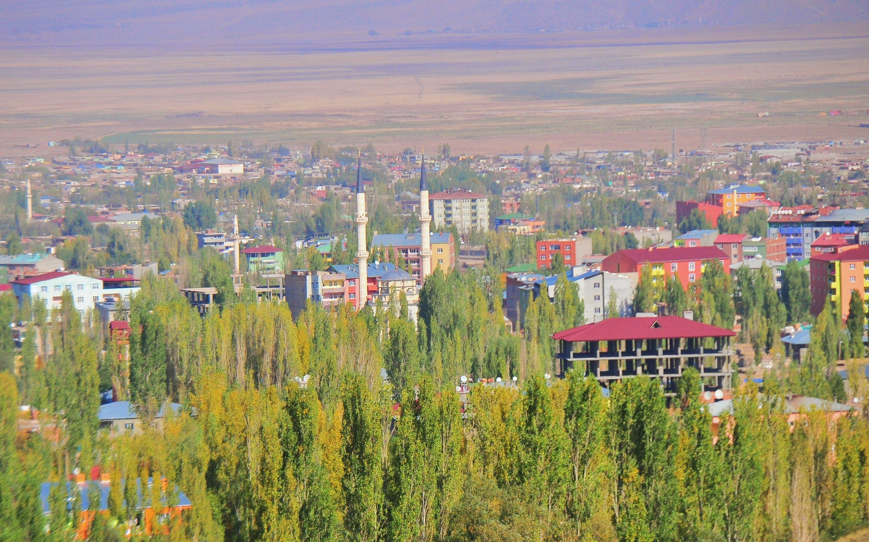 Kurdî: Bazid